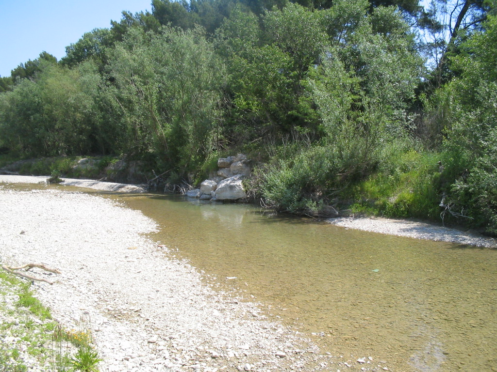 Ouvèze, river in France, Vaucluse, june 2005